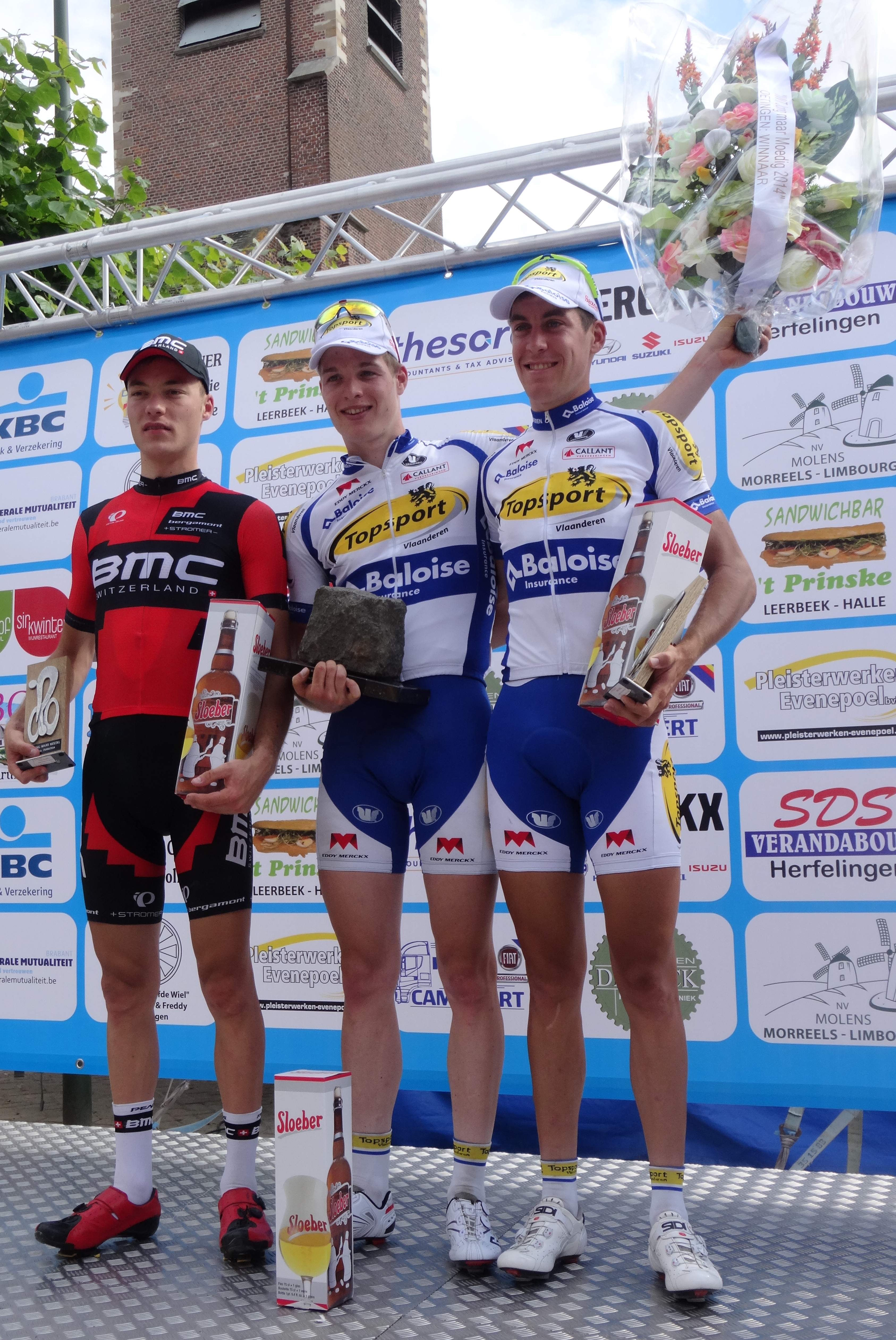 Reportage photographique réalisé le mercredi 25 juin à l'occasion du départ et de l'arrivée de l'Internationale Wielertrofee Jong Maar Moedig 2014 à Oetingen (Gooik), Belgique.